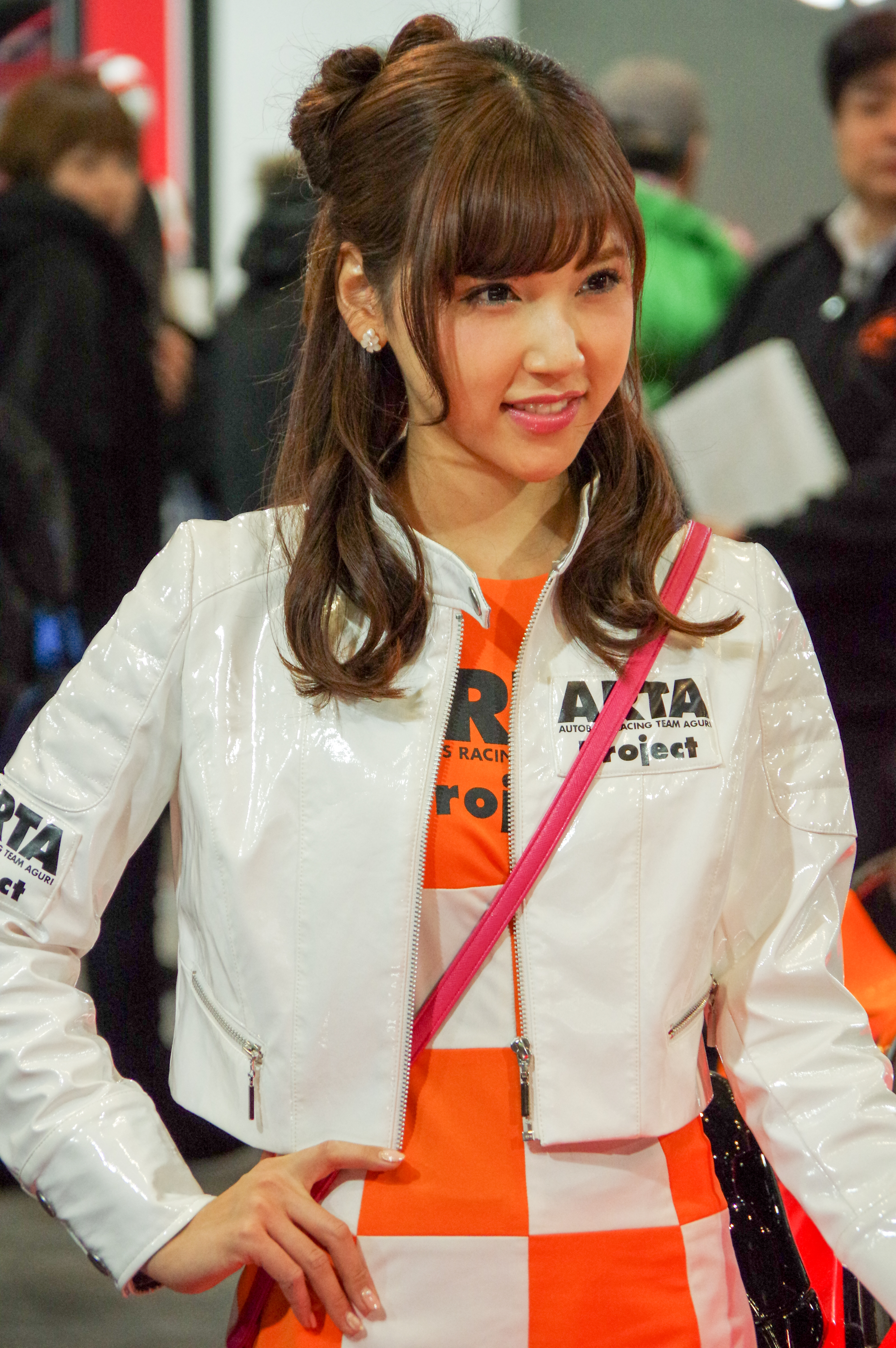 TOKYO AUTO SALON 2016 _35